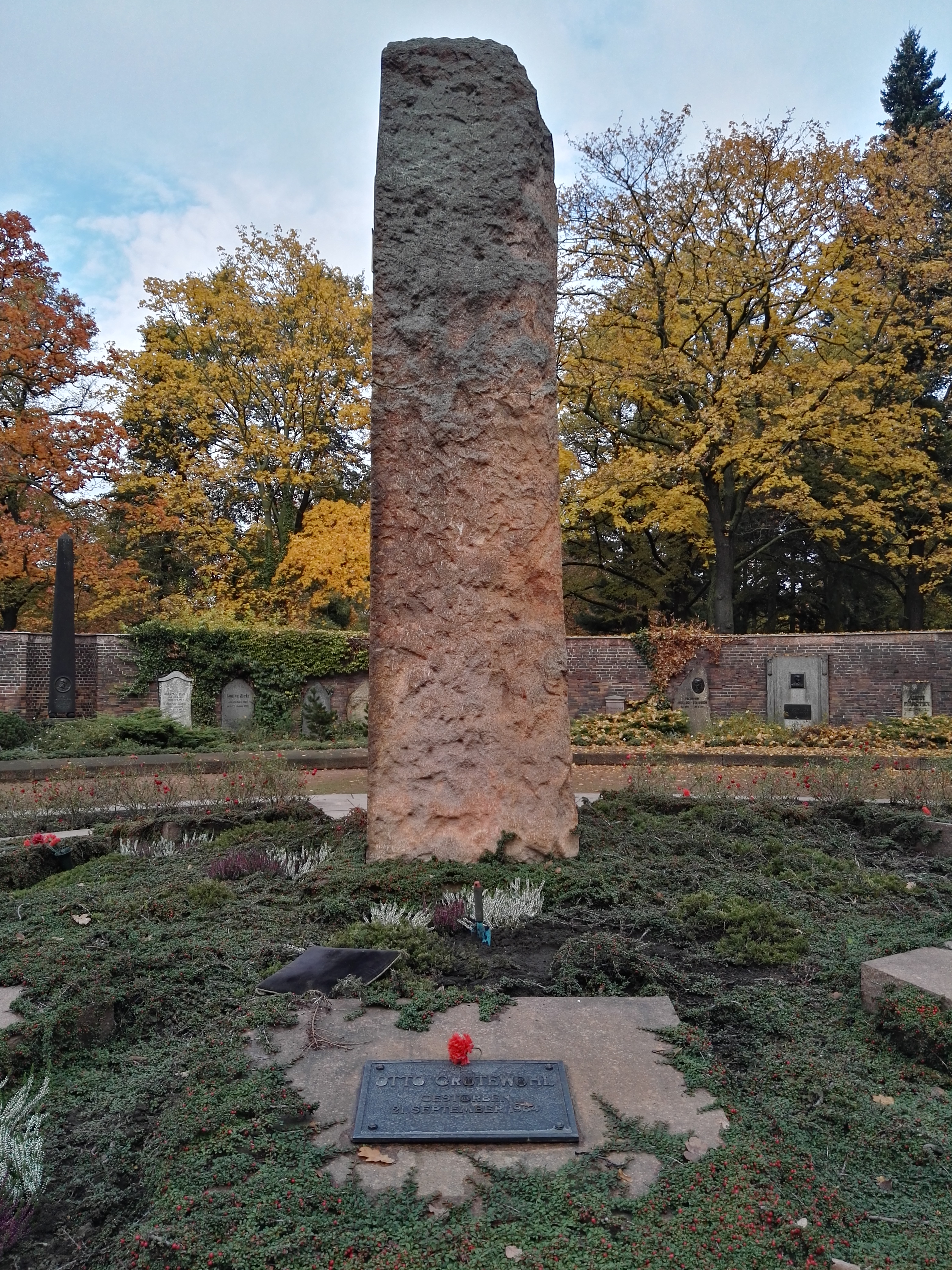 Grab von Otto Grotewohl im Rondell in der Gedenkstätte der Sozialisten auf dem Zentralfriedhof Friedrichsfelde in Berlin-Lichtenberg